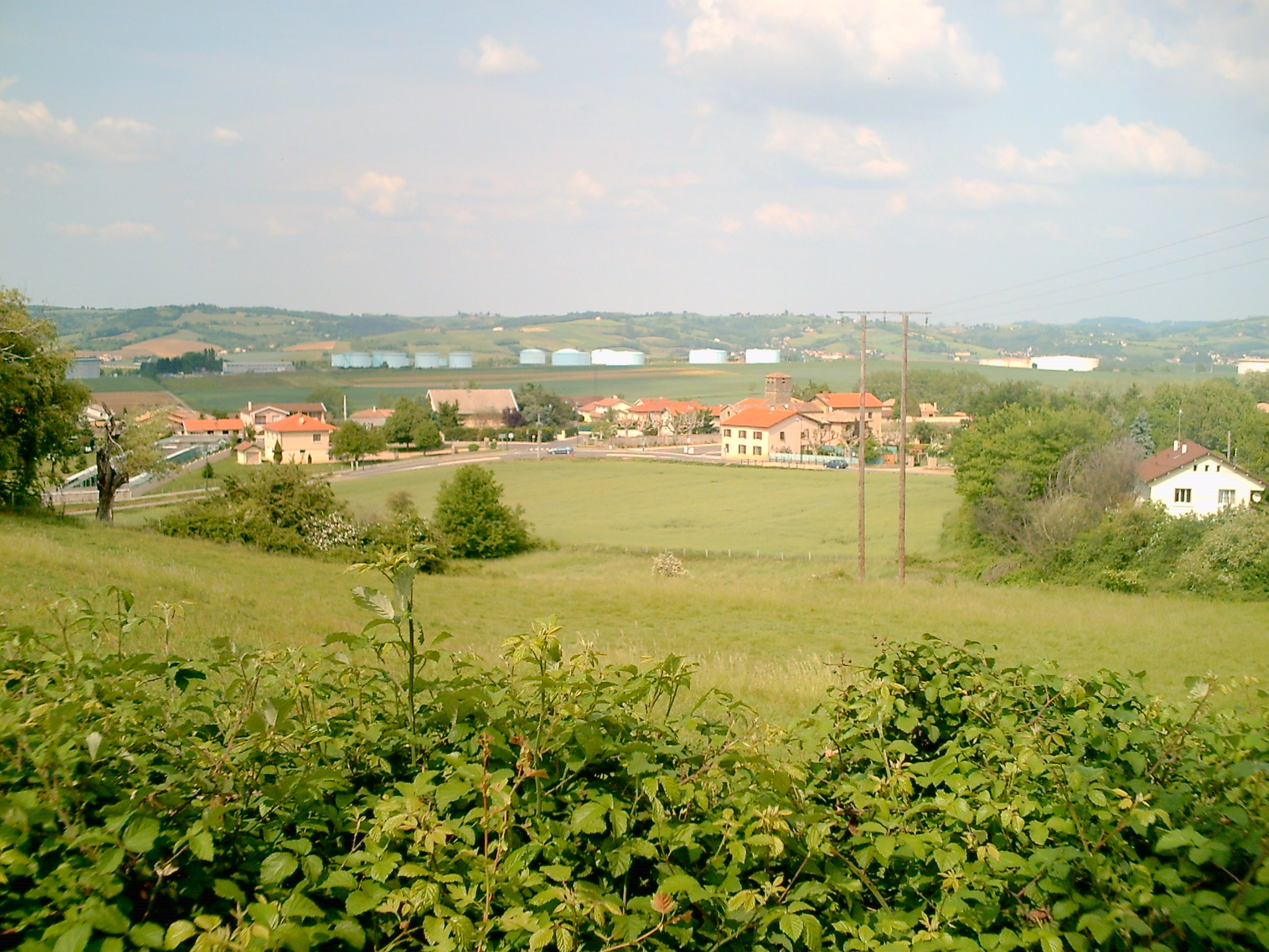 Quartier de l'église Serpaize (Isère, France)